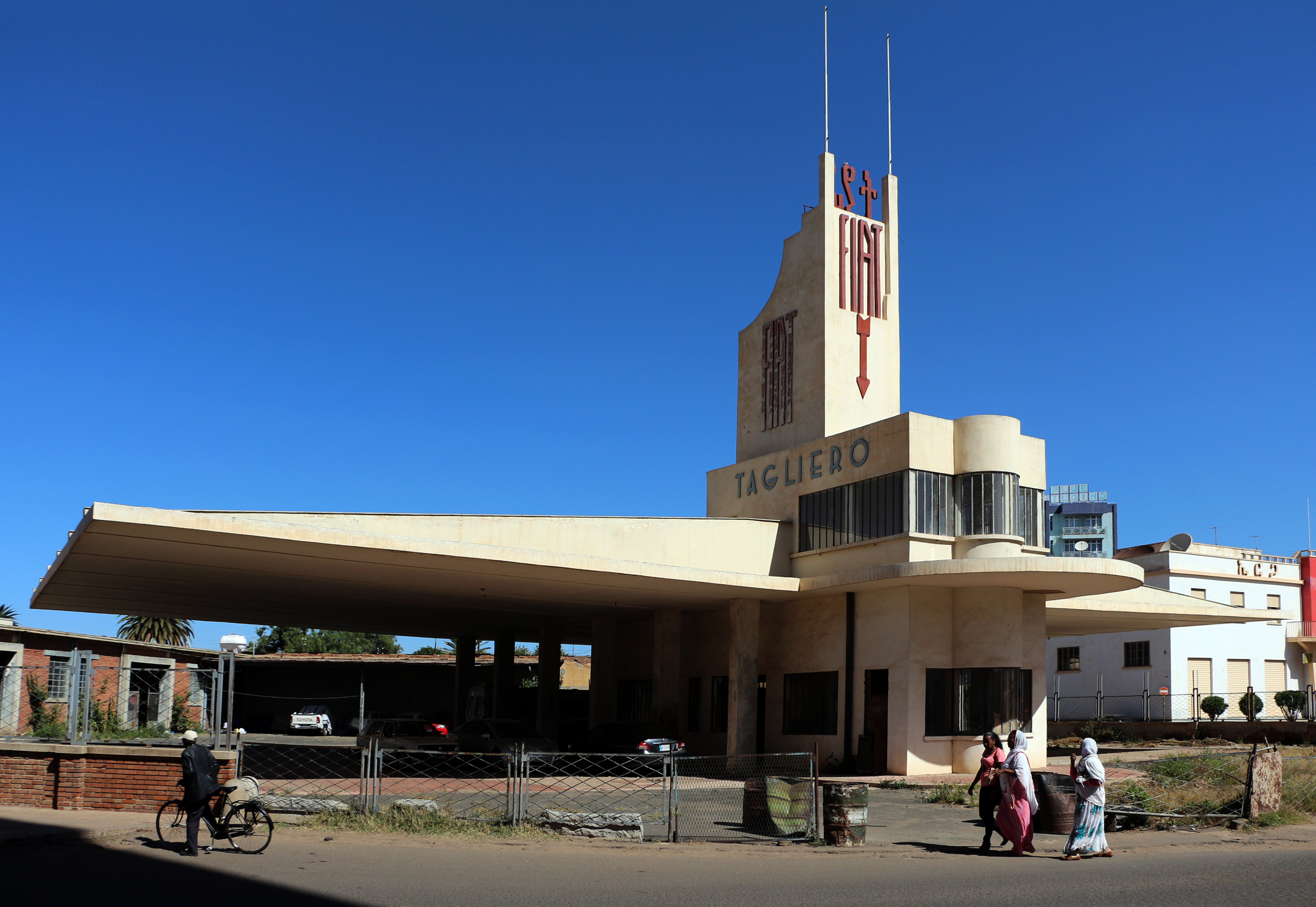 Fiat tagliero, 01.JPG